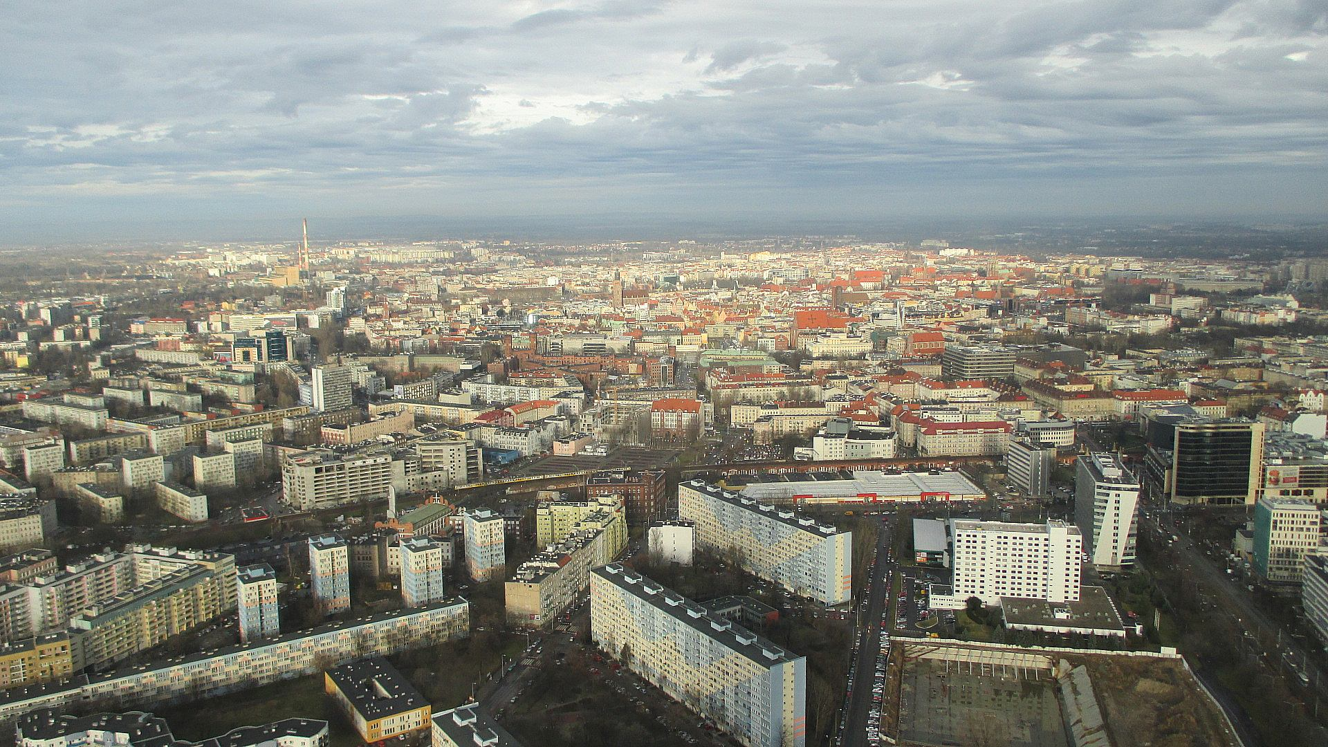 Widok z Sky Tower w kierunku północnym i północno-wschodnim